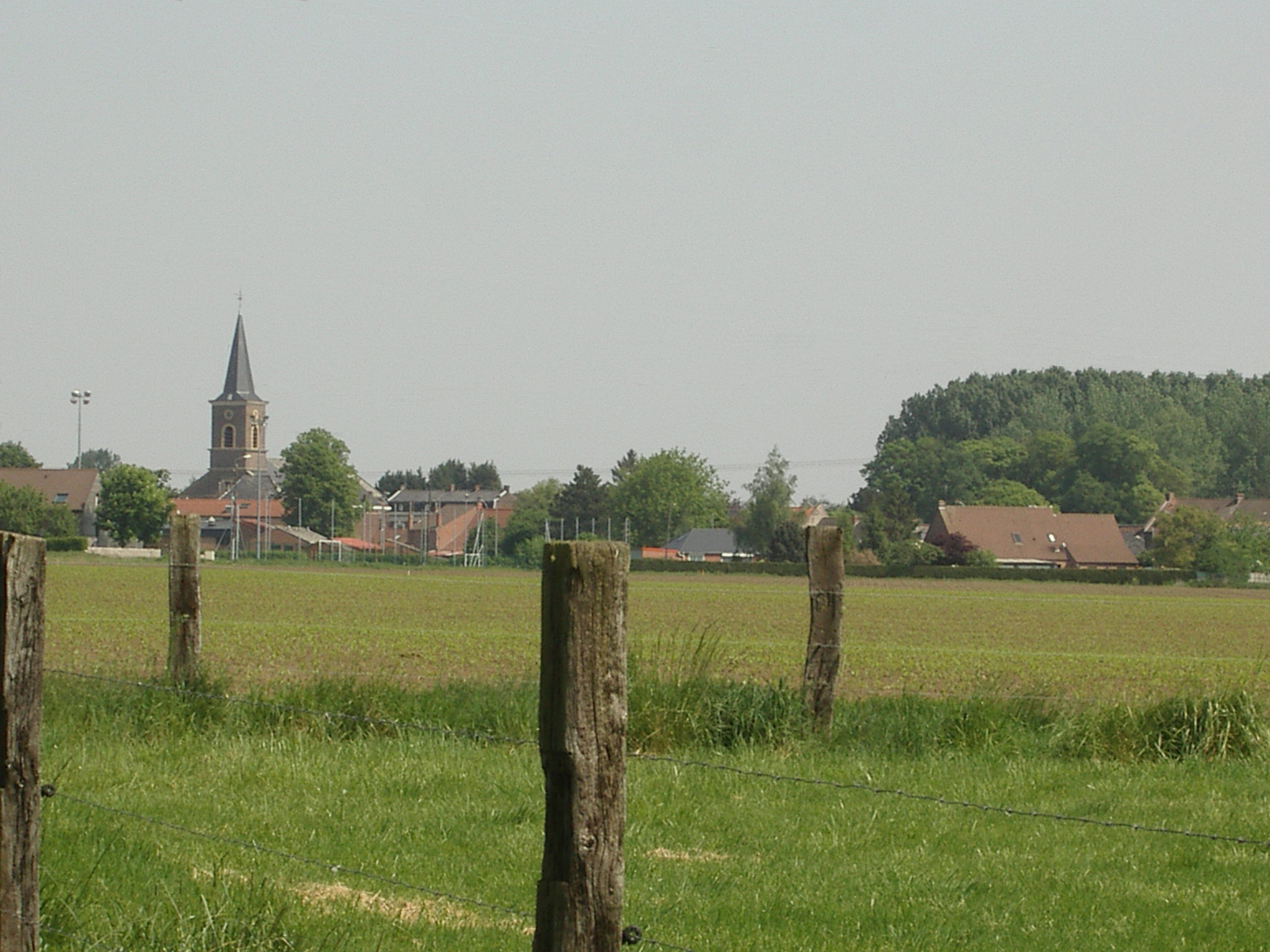 Village de Coutiches (France, Nord)